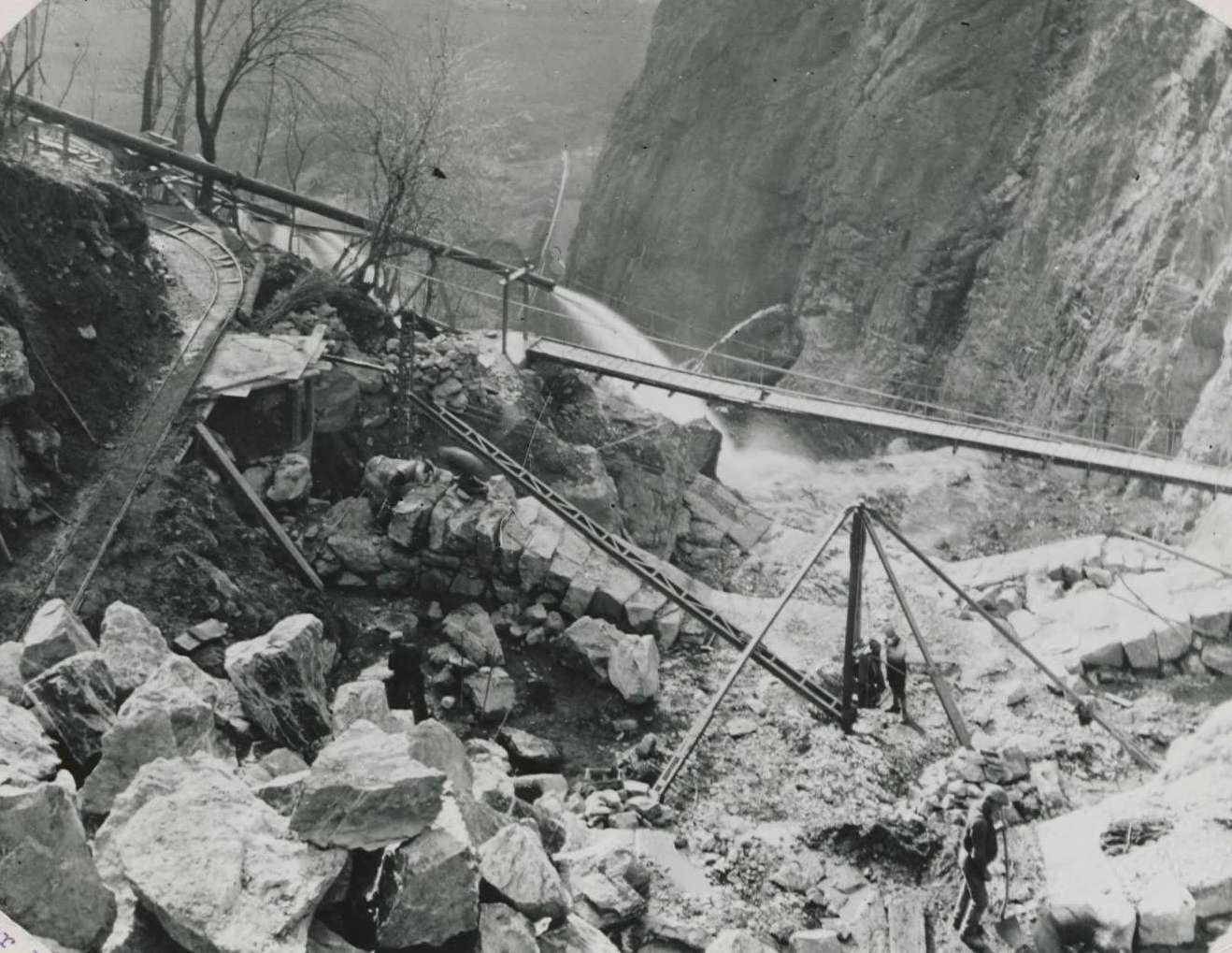 Torrent de Pontamafrey Barrages Magnin-N° 43-41 (Cliche Plagnat, 15 Janvier 1936)